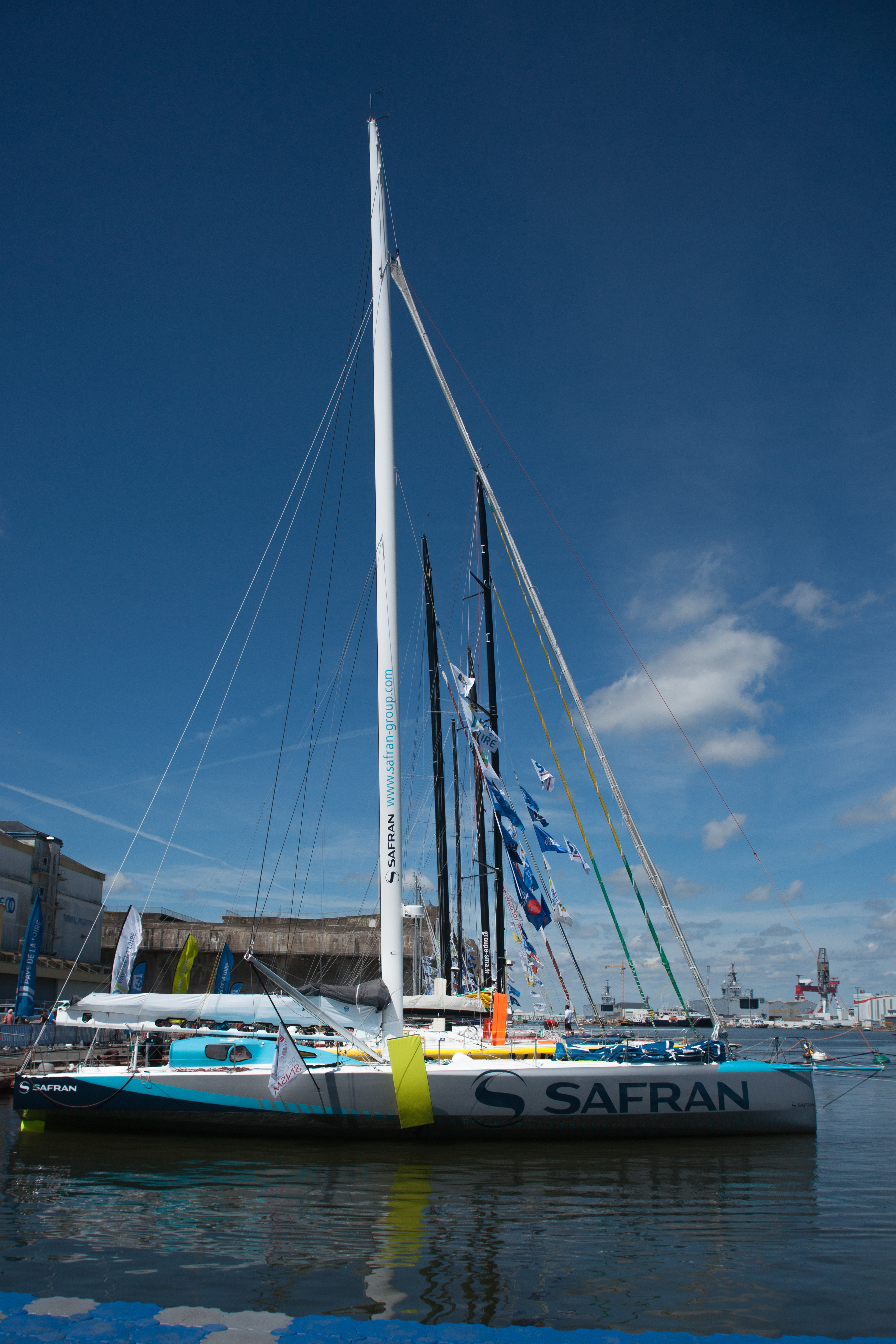 Record SNSM 2015 - Safran II au port